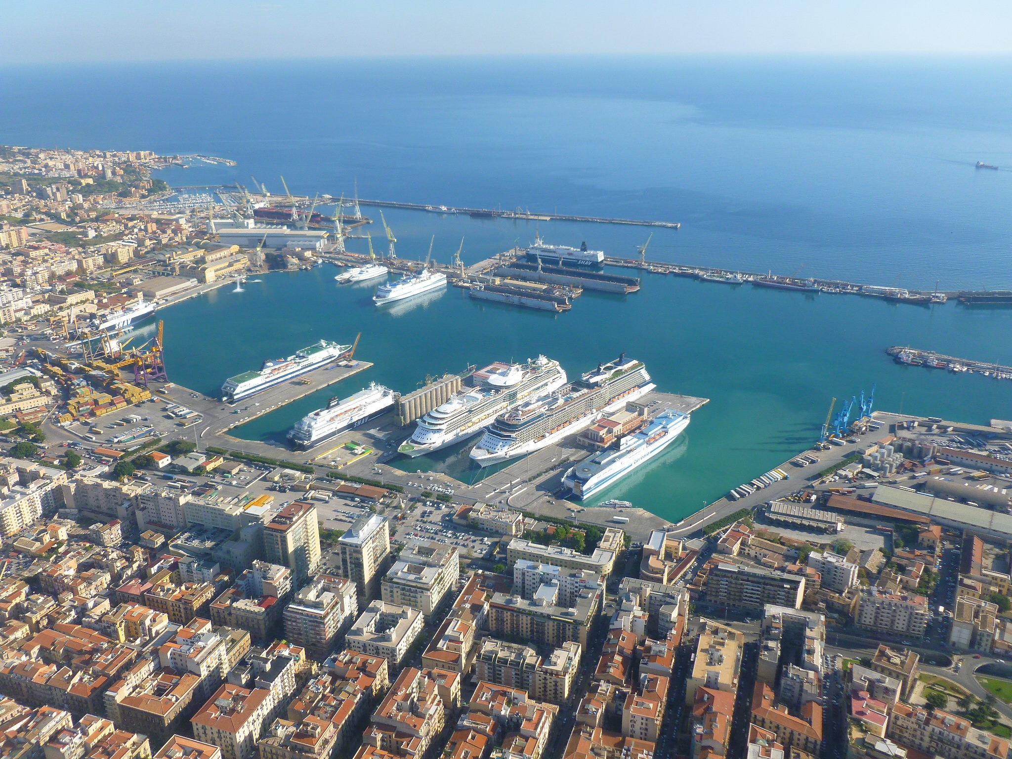 porto e bacini di Palermo dall'alto